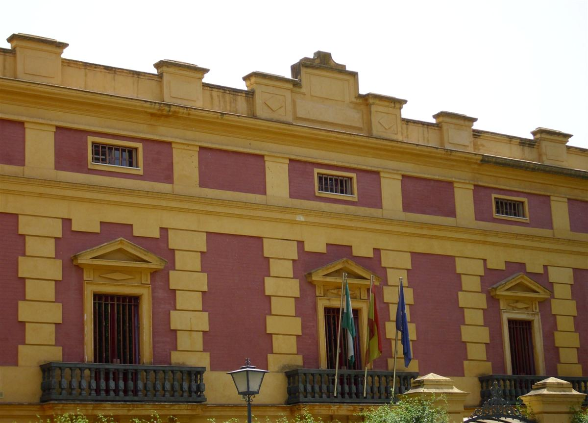 Sevilla, plaza de la Gavidia. Edificio de la antigua sede de la Capitanía General